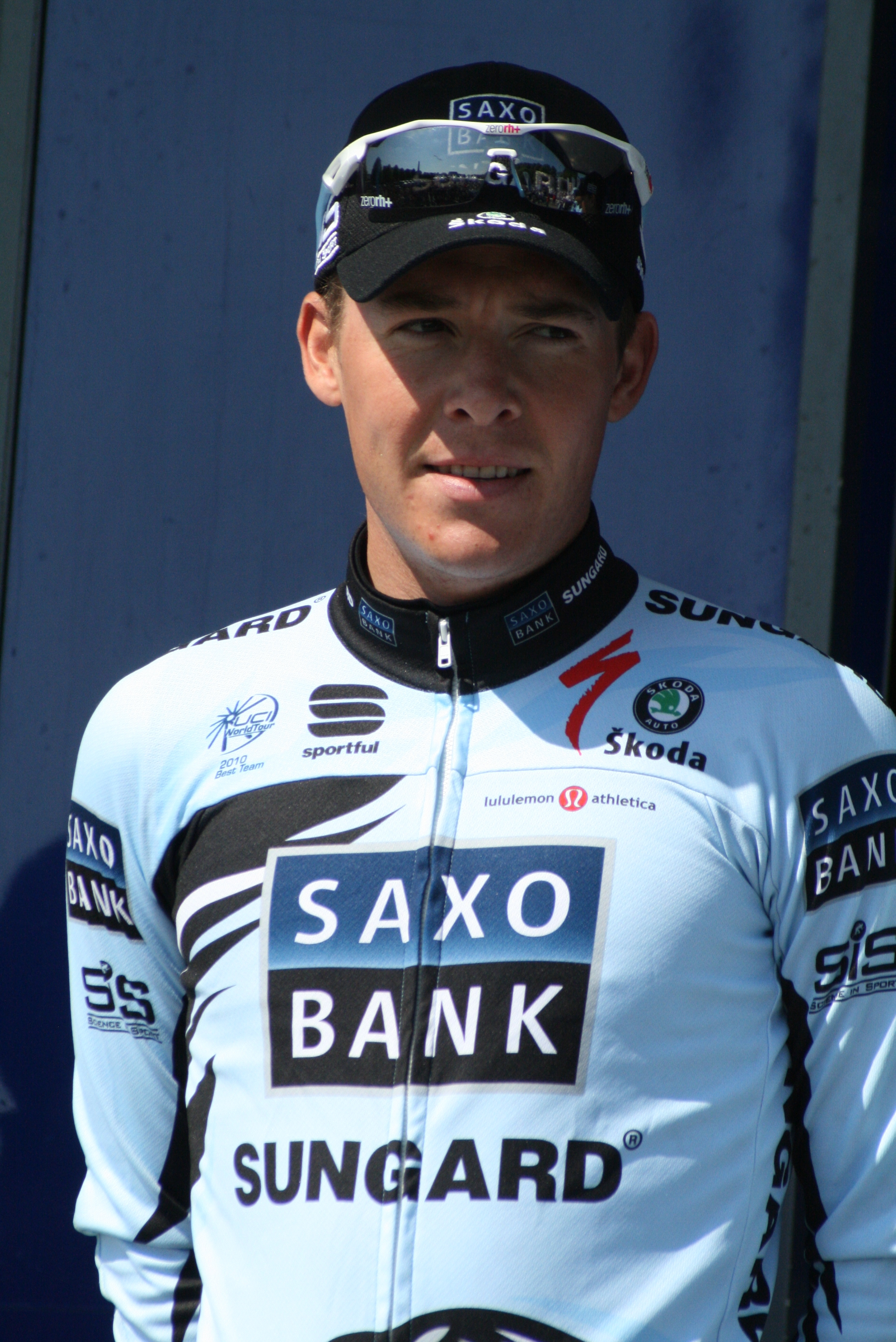 Présentation des coureurs au départ de la première étape Jonas Aaen Jørgensen